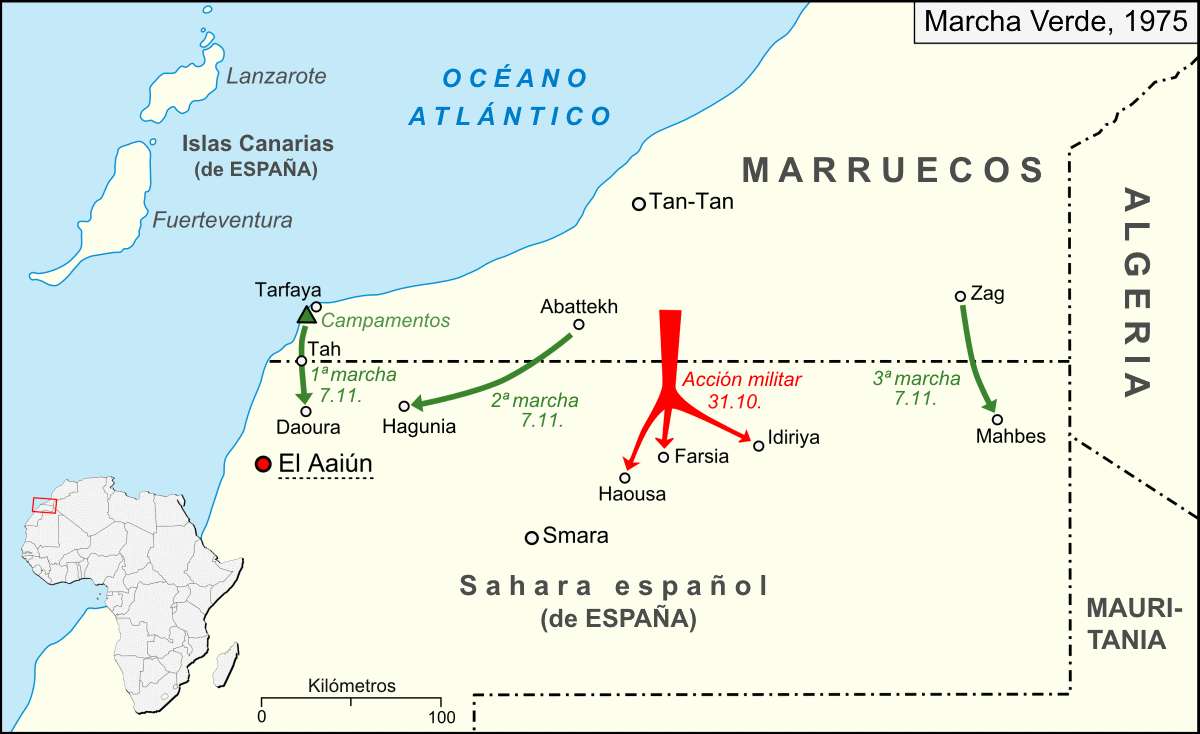 La Marcha Verde en noviembre de 1975. Marruecos se esfuerza por anexionarse el Sahara Español (más tarde Sahara Occidental). El mapa ha sido traducido del alemán al español.